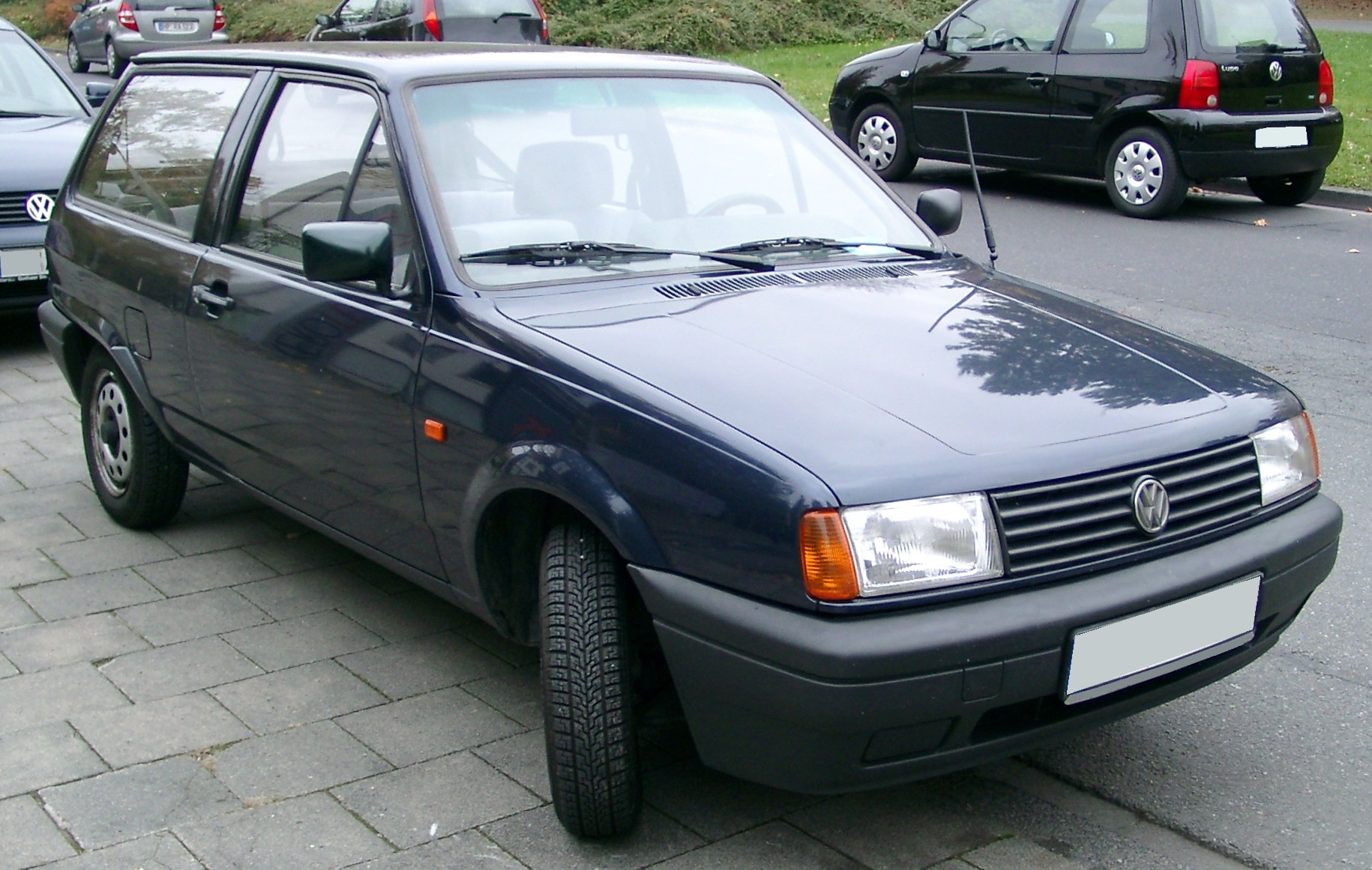 VW Polo 2F